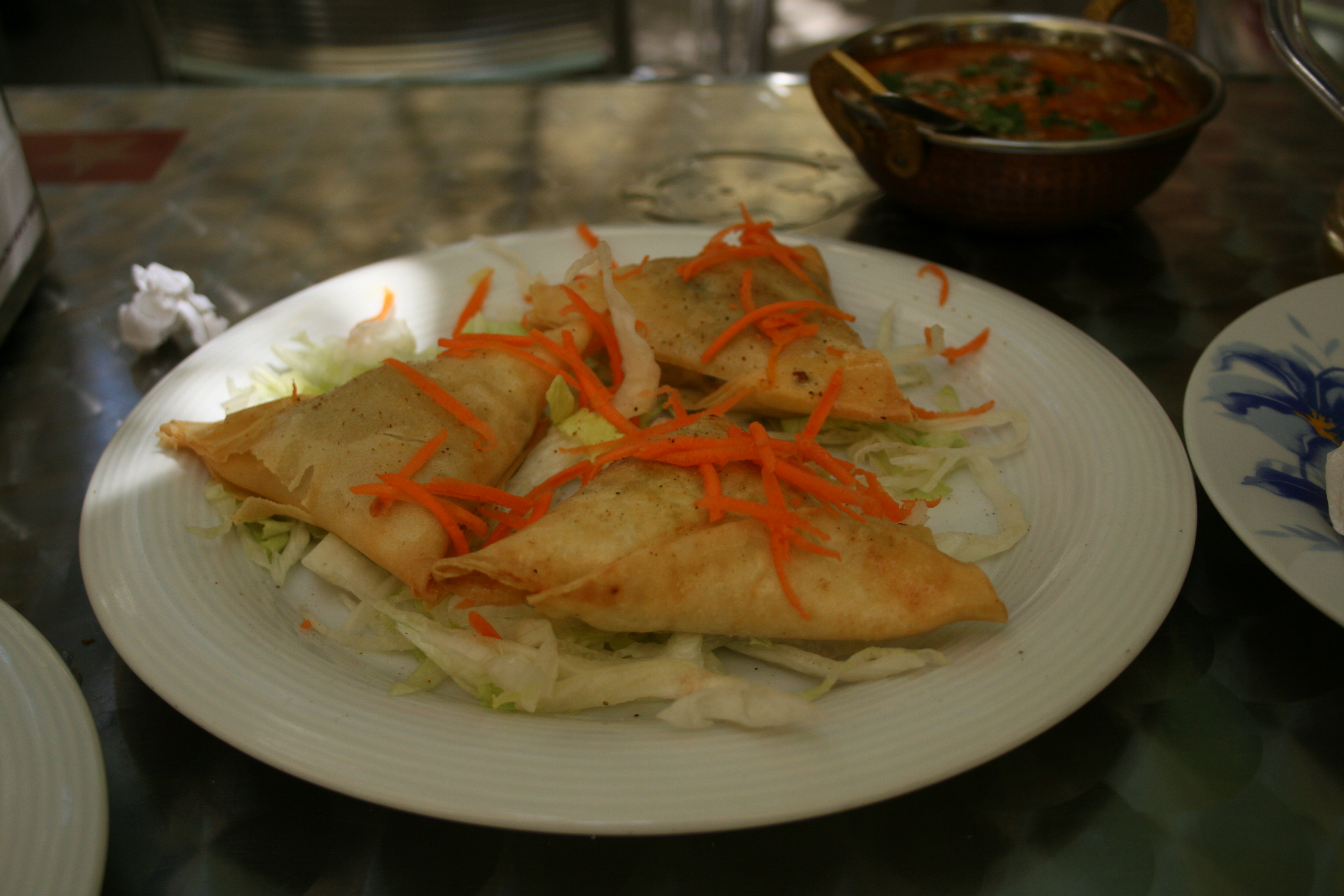 Samosa en un Restaurante Indio en Madrid (Lavapies)